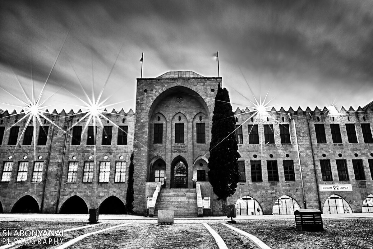 בניין הטכניון ההיסטורי בשכונת הדר כרמל בחיפה